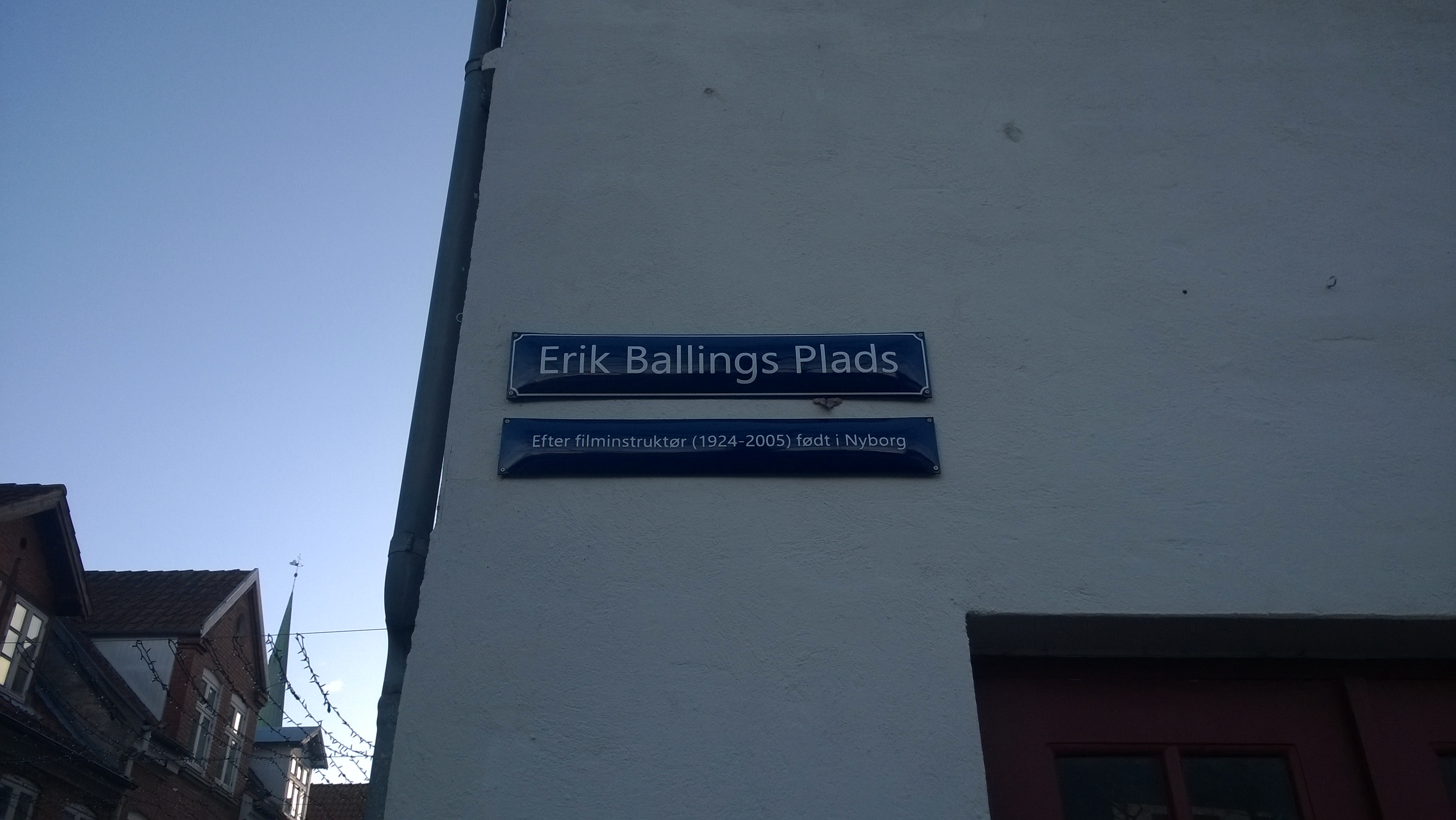 Vejskilt på Erik Ballings Plads i Nyborg (hjørnet af Vægtergade og Nørrevoldgade).